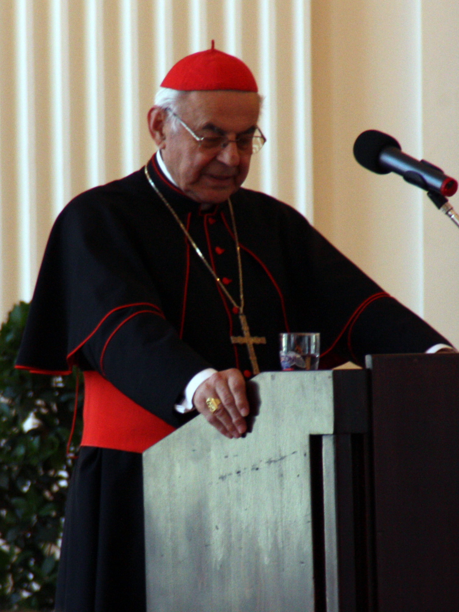 Kardinal Vlk anläßlich der Verleihung des Adalbert-Preises in Prag